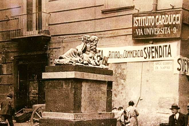 Napoli, statua del Nilo in Largo Corpo di Napoli. La statua risulta ancora abbastanza integra nei suoi dettagli (sfinge, bambini). Autore della foto sconosciuto.